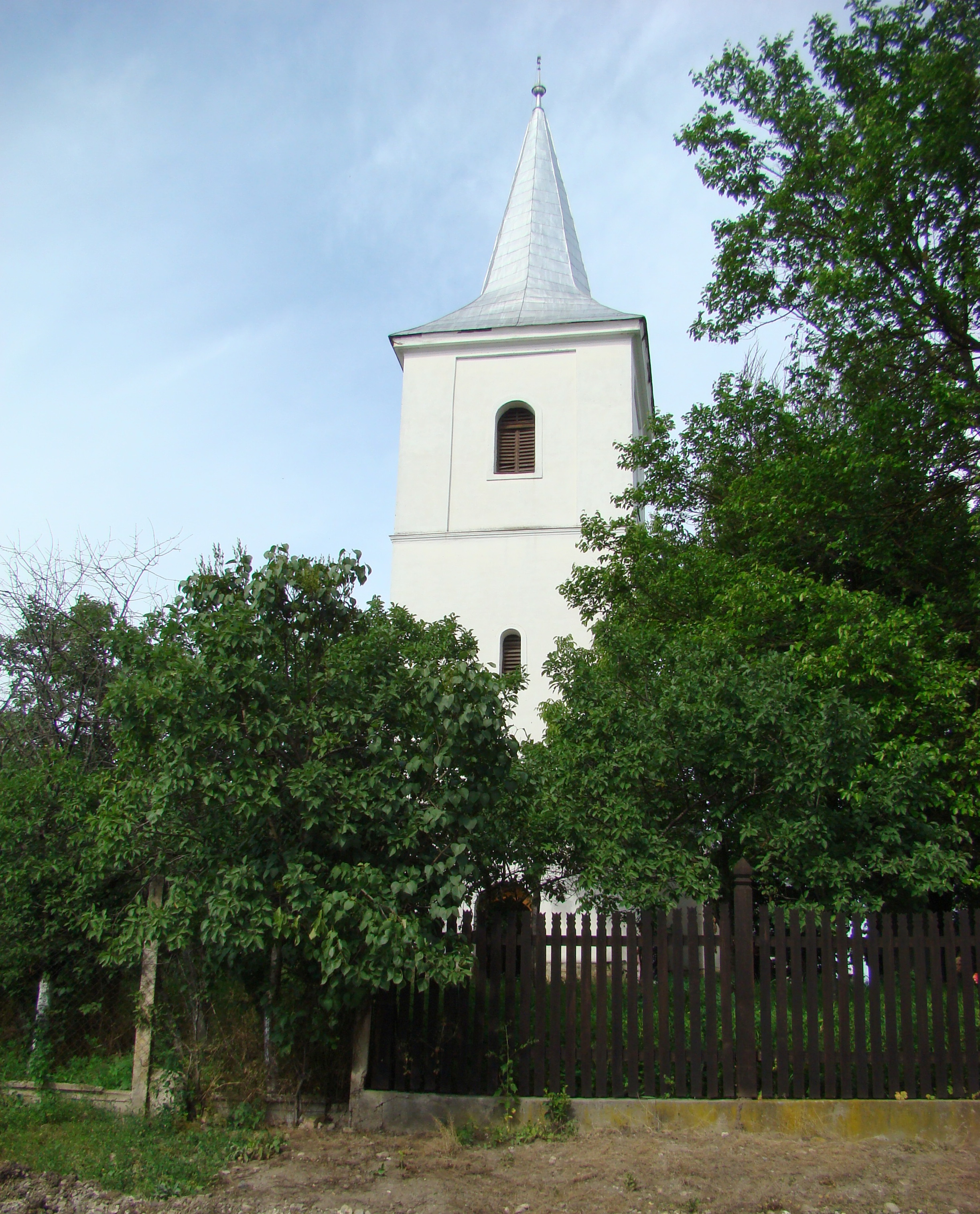 Biserica reformată din satul Lopadea Nouă; comuna Lopadea Nouă, județul Alba